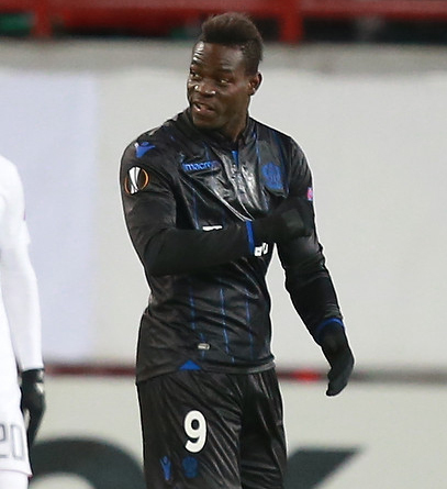 «Локомотив» положил на лопатки «Ниццу» в Москве